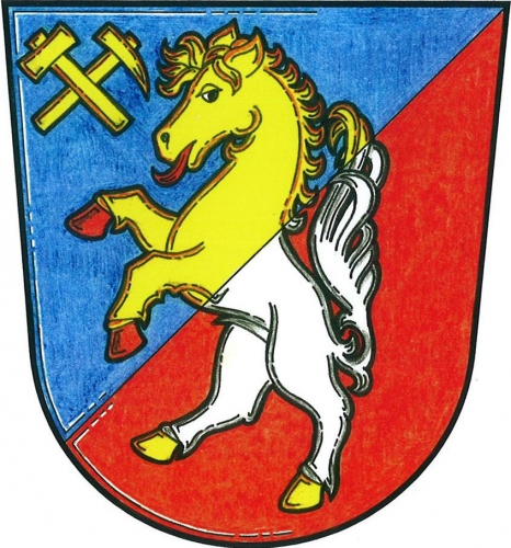 znak, Nová Ves pod Pleší, okres Příbram